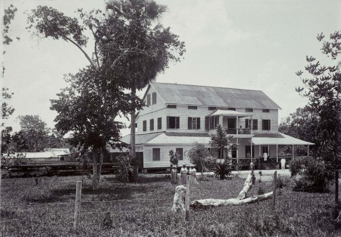 Woonhuis op de plantage Catharina Sophia in de omgeving van Paramaribo te Suriname